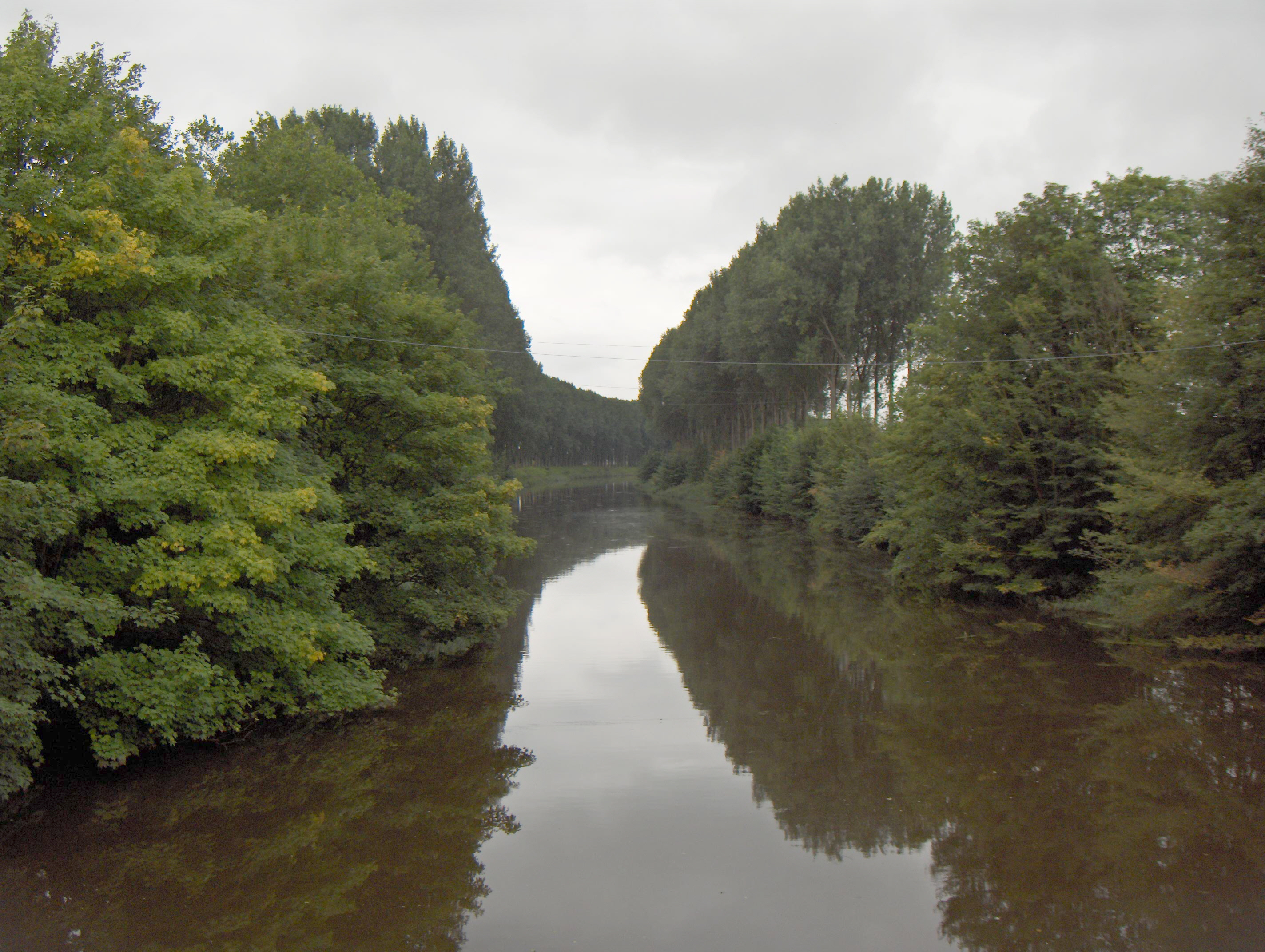 Beschreibung: Leopoldskanal (Belgien, Gemeinde Damme, Westflandern), Standpunkt: Kreuzung mit der "Damse vaart", Blick nordwärts Fotograf: Friedrich Tellberg Datum: 21. August 2005